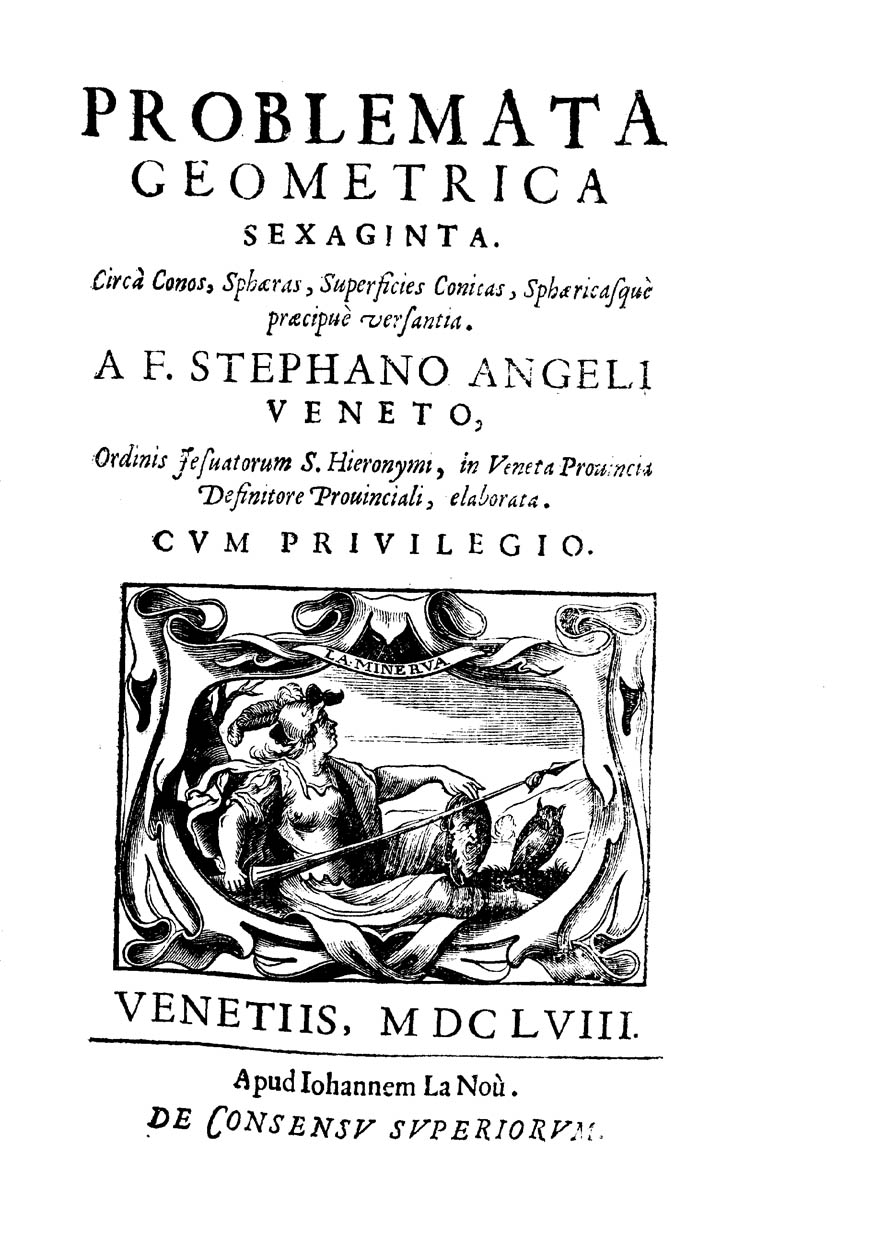 Problemata geometrica sexaginta. Circa conos, sphaeras, superficies conicas, sphaericasque praecipue versantia. A F. Stephano Angeli Veneto, ordinis Jesuatorum S. Hieronymi, in Veneta prouincia definitore prouinciali, elaborata. - Venetiis : apud Iohannem La Noù, 1658. - [8], 296 [i.e. 292] p. : ill. ; 4º .